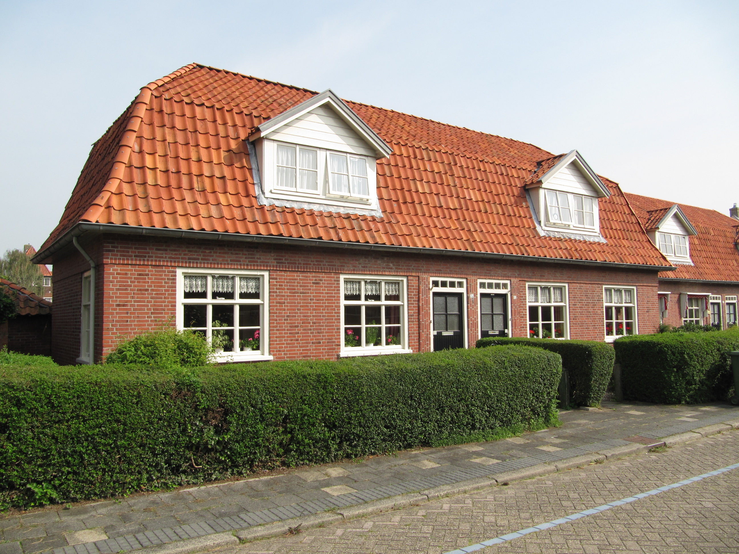 RM519808 Leeuwarden - Franekerstraat 72-74.jpg